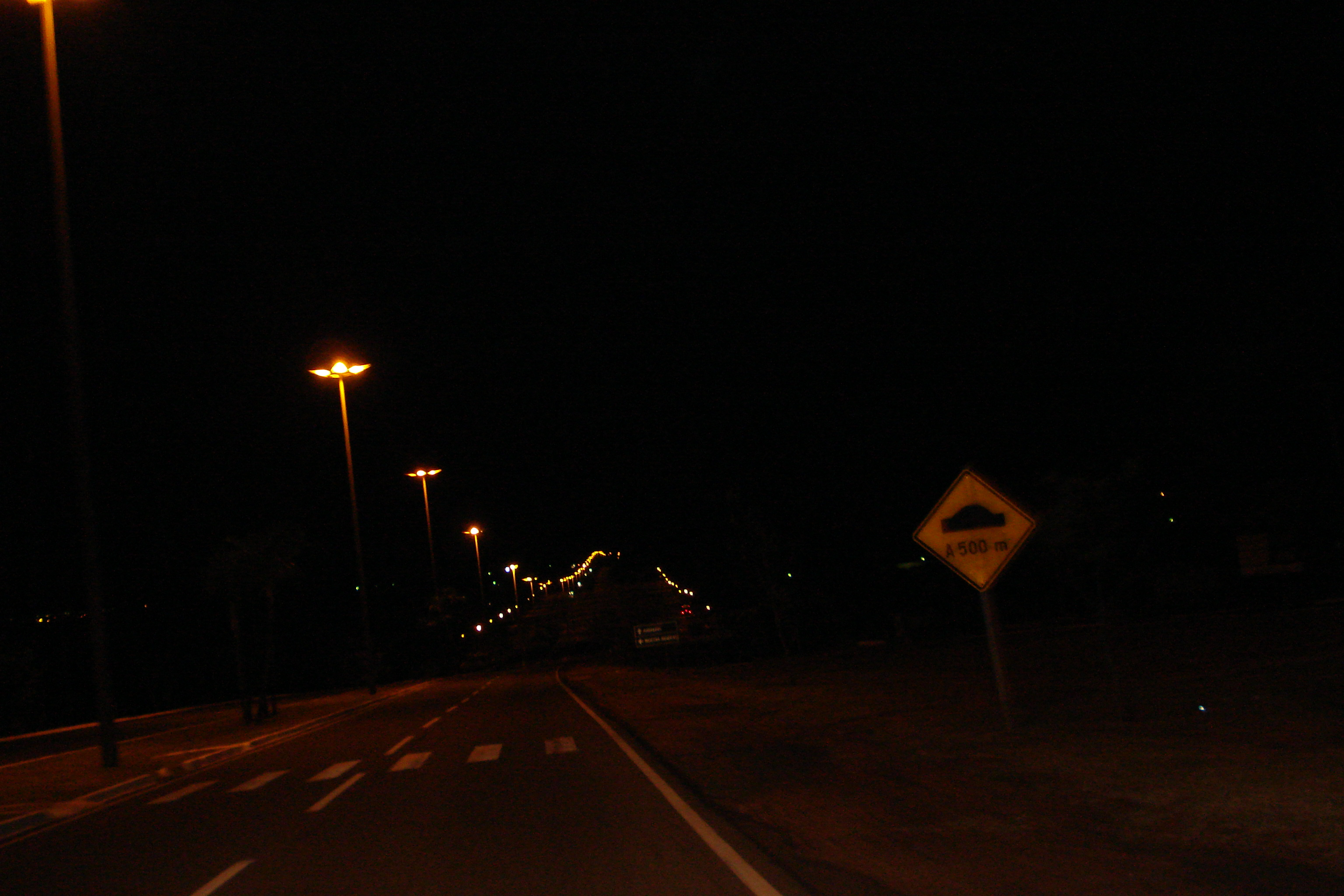 Gury Marques Avenue